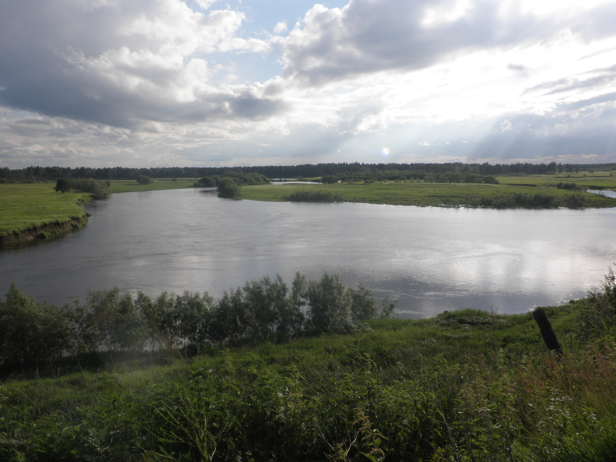 место слияния рек в д.Морозково Свердловской области